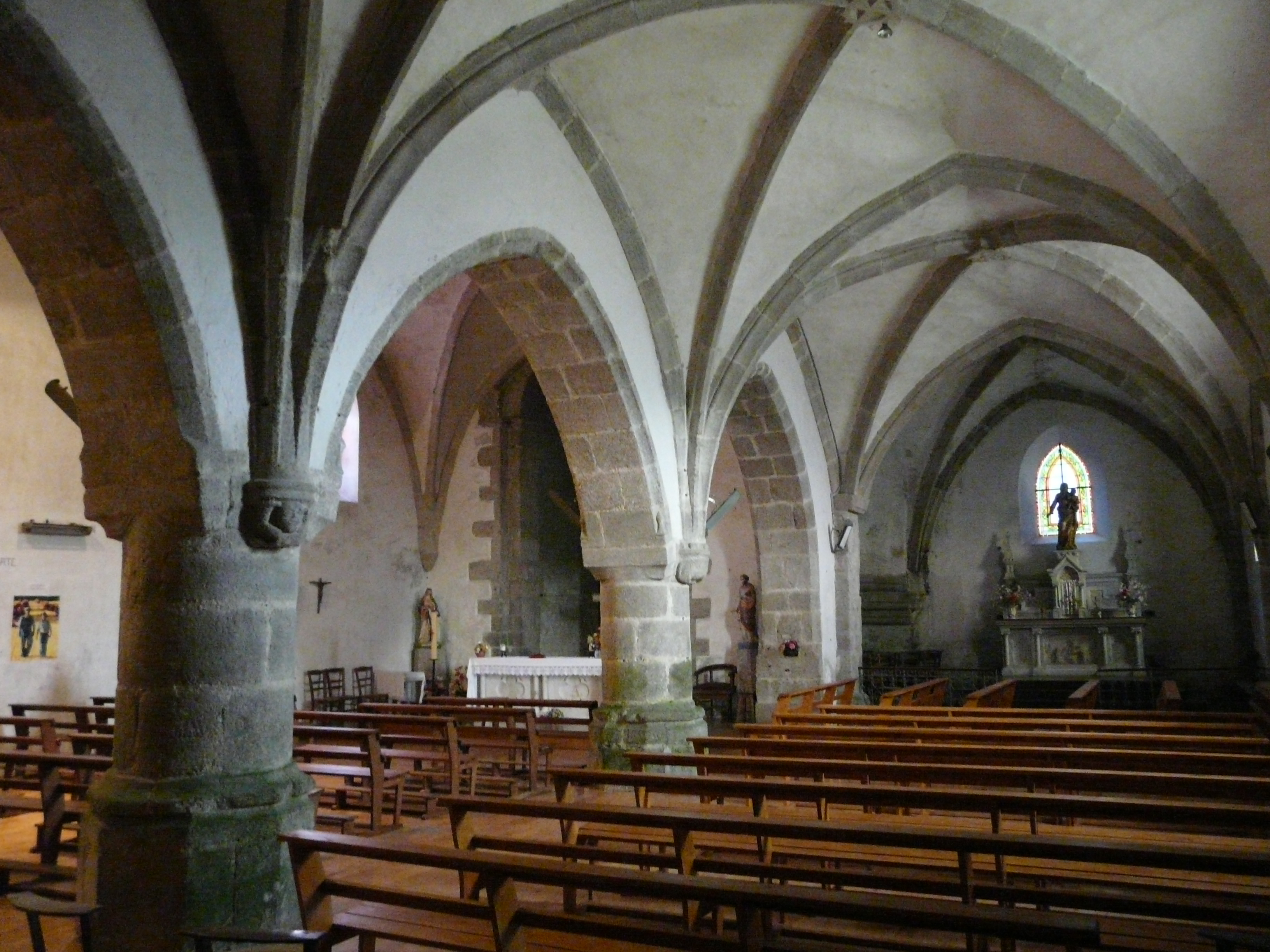 Les deux nefs de l'église Saint-Martial de Busserolles, Dordogne, France.